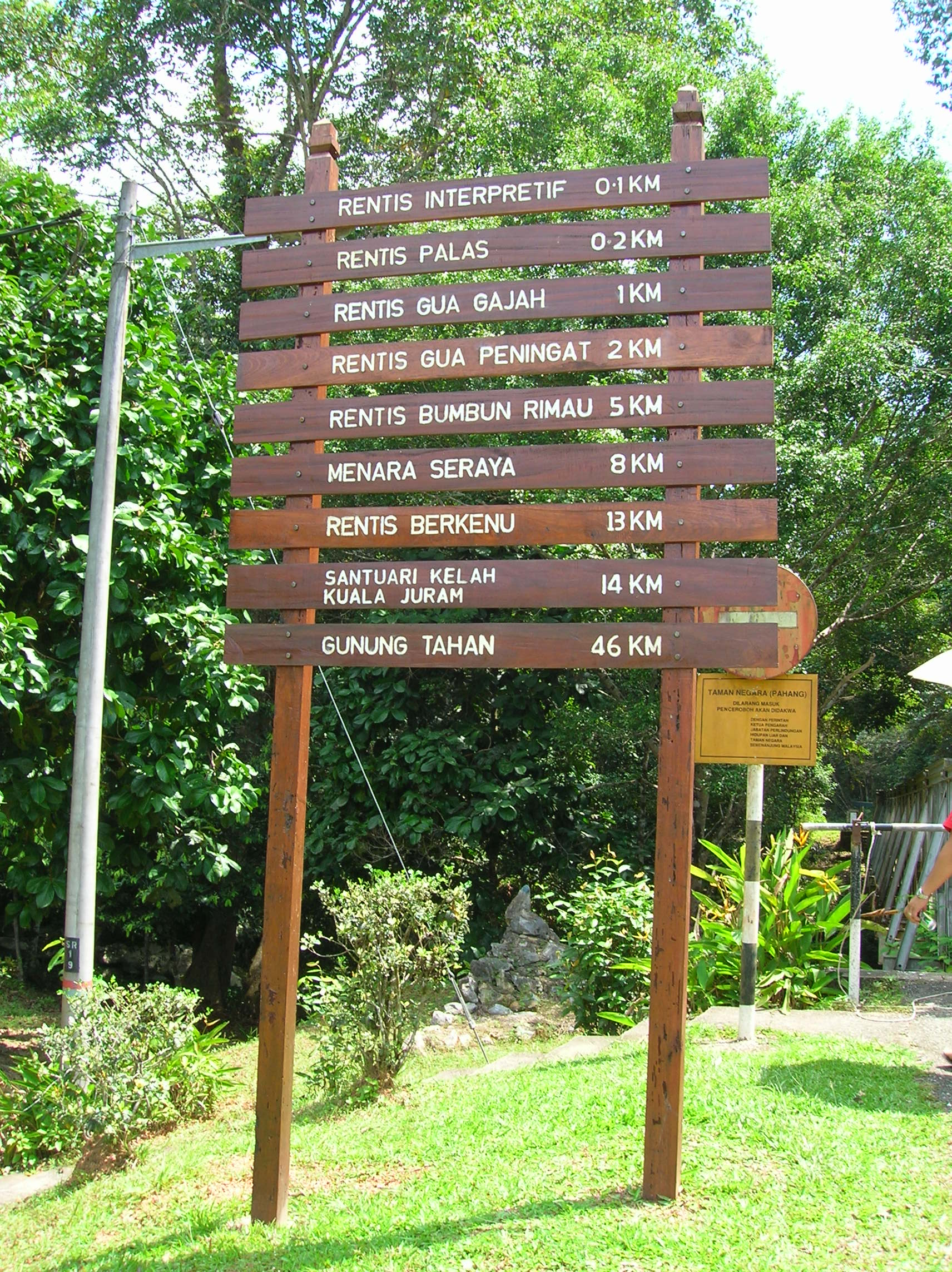 [Taman Negara @ Sungai Relau, Pahang] Rentis Interpretif 0.1km + Rentis Palas 0.2km + Rentis Gua Gajah 1km + Rentis Gua Peningat 2km + Rentis Bumbun Rimau 5km + Menara Seraya 8km + Rentis Berkenu 13km + Santuari Kelah, Kuala Juram 14km + Gunung Tahan 46km